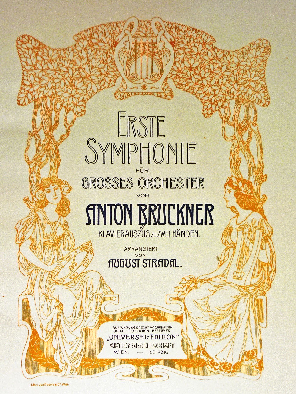 Erste Symphony für großes Orchester von Anton Bruckner, Klavierauszug zu zwei Händen, arrangiert von August Stradal, Universal-Edition Wien – Leipzig, Nr. 426 (Musikaliendruckerei Jos. Eberle & Co. Wien), 1904